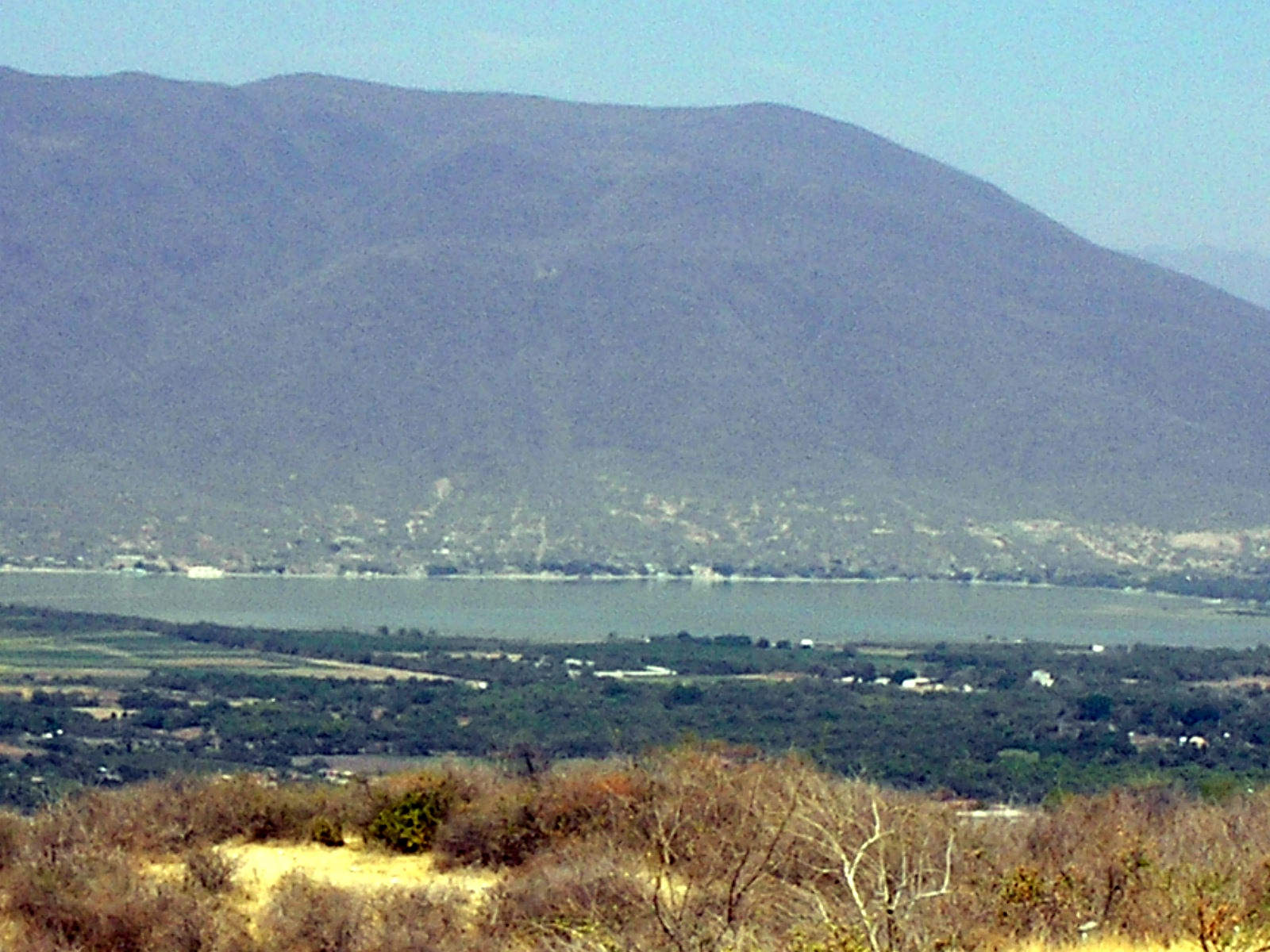 Panoramica de La Laguna de Tuxpan